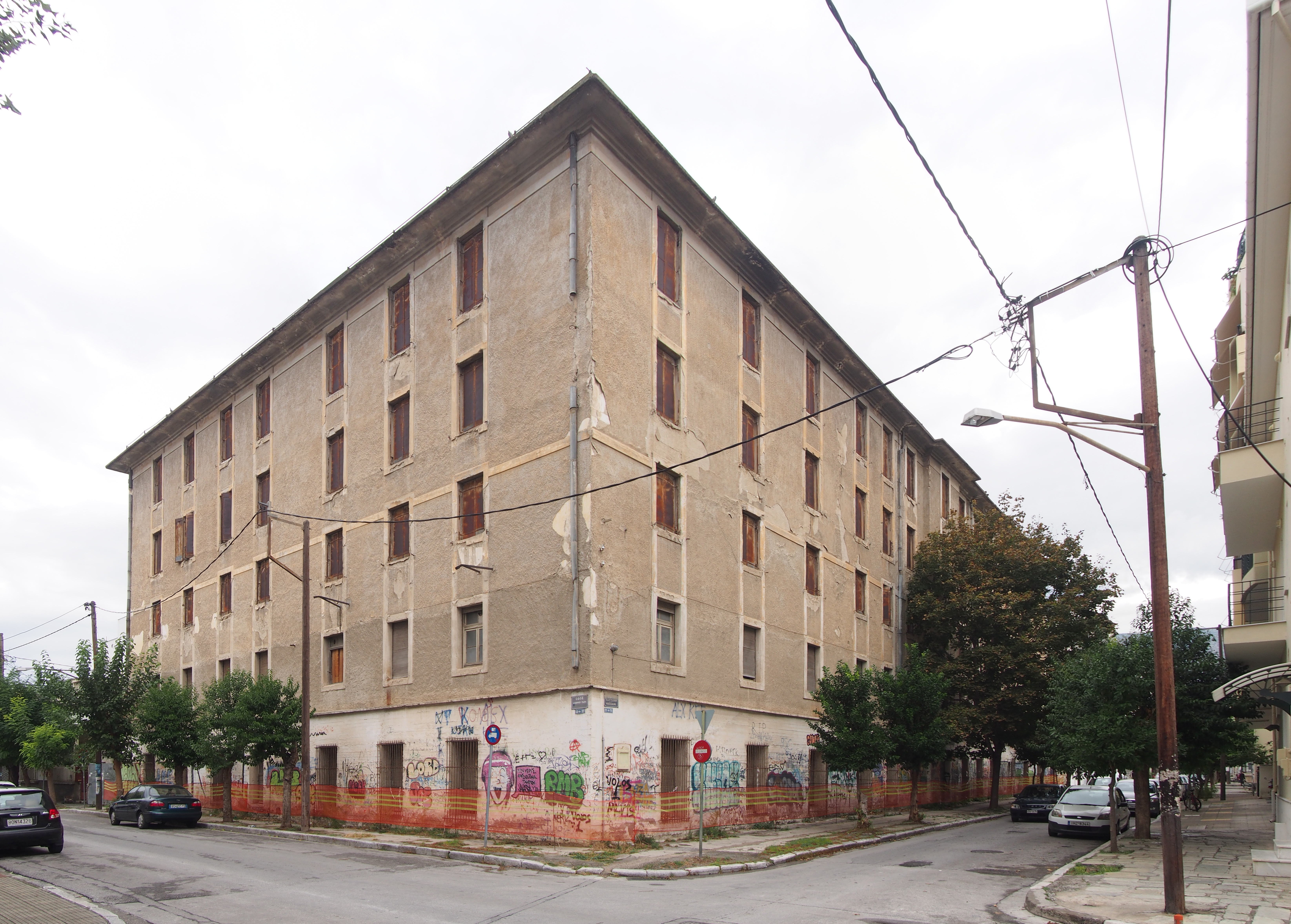 Κίτρινη Αποθήκη, καπναποθήκη κτισμένη το 1926.«Κίτρινη Αποθήκη»